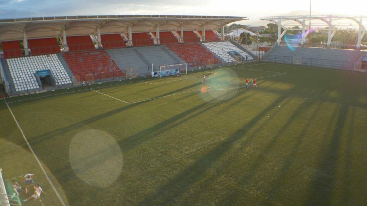 Estadio del Real Estelí FC.